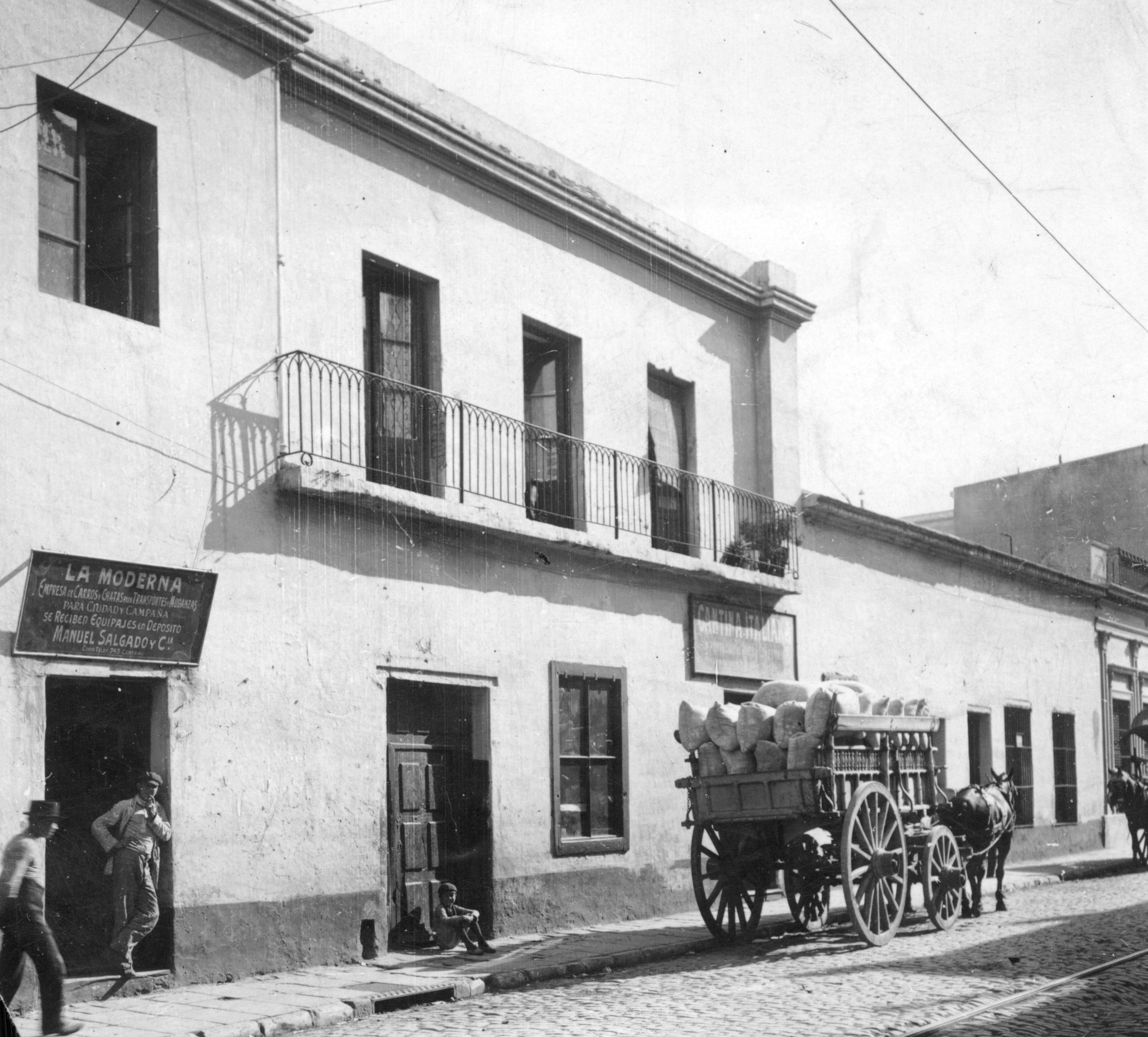 Jabonería de Vieytes, en la calle México 1506 s/f. Inventario 216900 General Archive of the Nation (Argentina) Native nameArchivo General de la Nación ArgentinaLocationBuenos Aires, ArgentinaEstablished28 August 1821WebsiteAGNAuthority control : Q2860529 This file, was provided to Wikimedia Commons thanks to an agreement between the General Archive of the Nation of Argentina and Wikimedia Argentina.